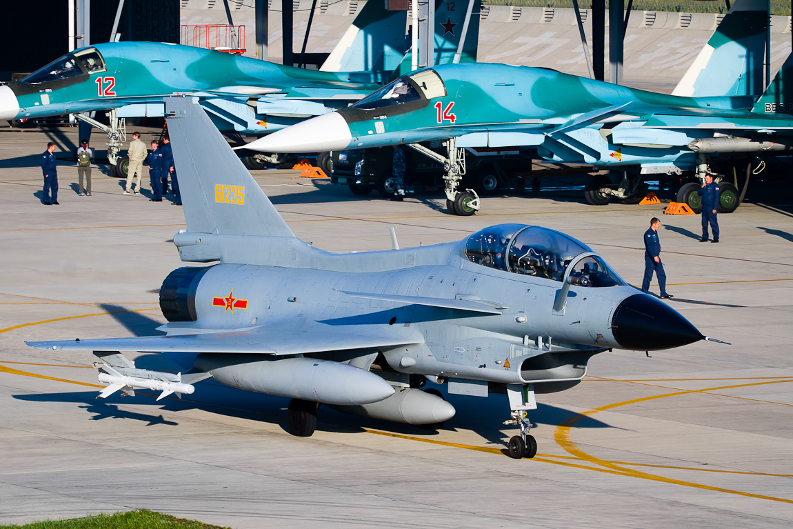 Зачетные полеты участников конкурса «Авиадартс» (п. Чанчунь, КНР)